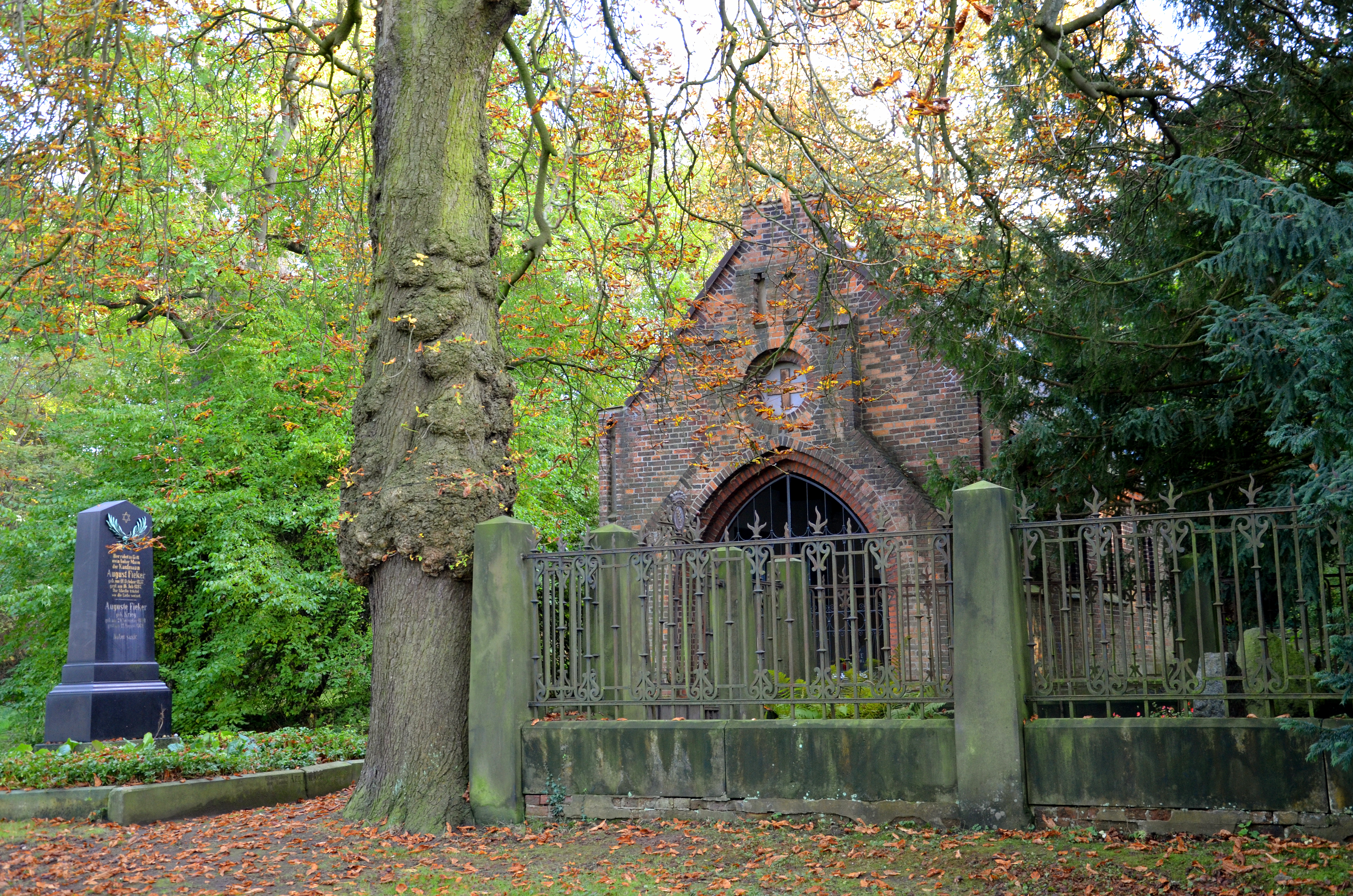 Die eingefriedete Familiengrabstätte insbesondere der Lindener Mitglieder der Adelsfamilie von Alten, dahinter die von dem Architekten Conrad Wilhelm Hase entworfene und 1864 eingeweihte Friedhofskapelle, weiter links das Grabmal des Kaufmanns August Fieker (1837–1897) und seiner Ehefrau Auguste, geborene Krieg; gesehen auf dem heute als Park genutzten Stadtteilfriedhof Lindener Berg ...